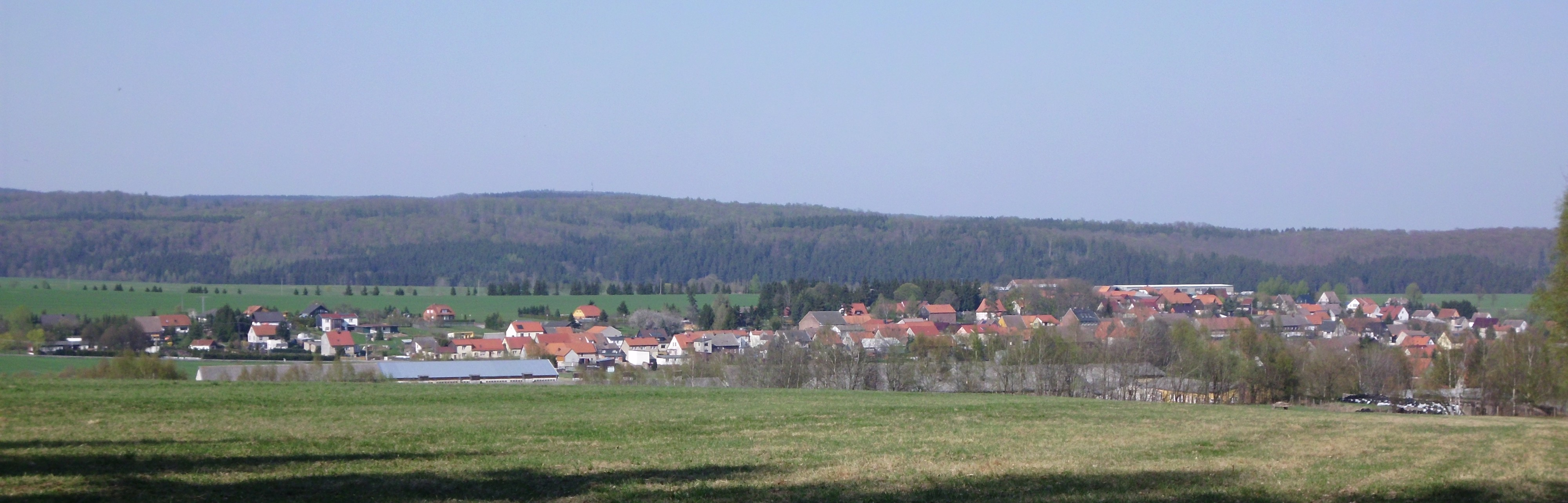 Blick auf Siptenfelde, Stadt Harzgerode